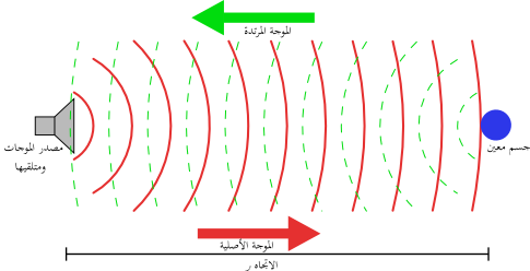 رحلة الموجة السونارية أو الرادارية ذهابًا وإيابًا.